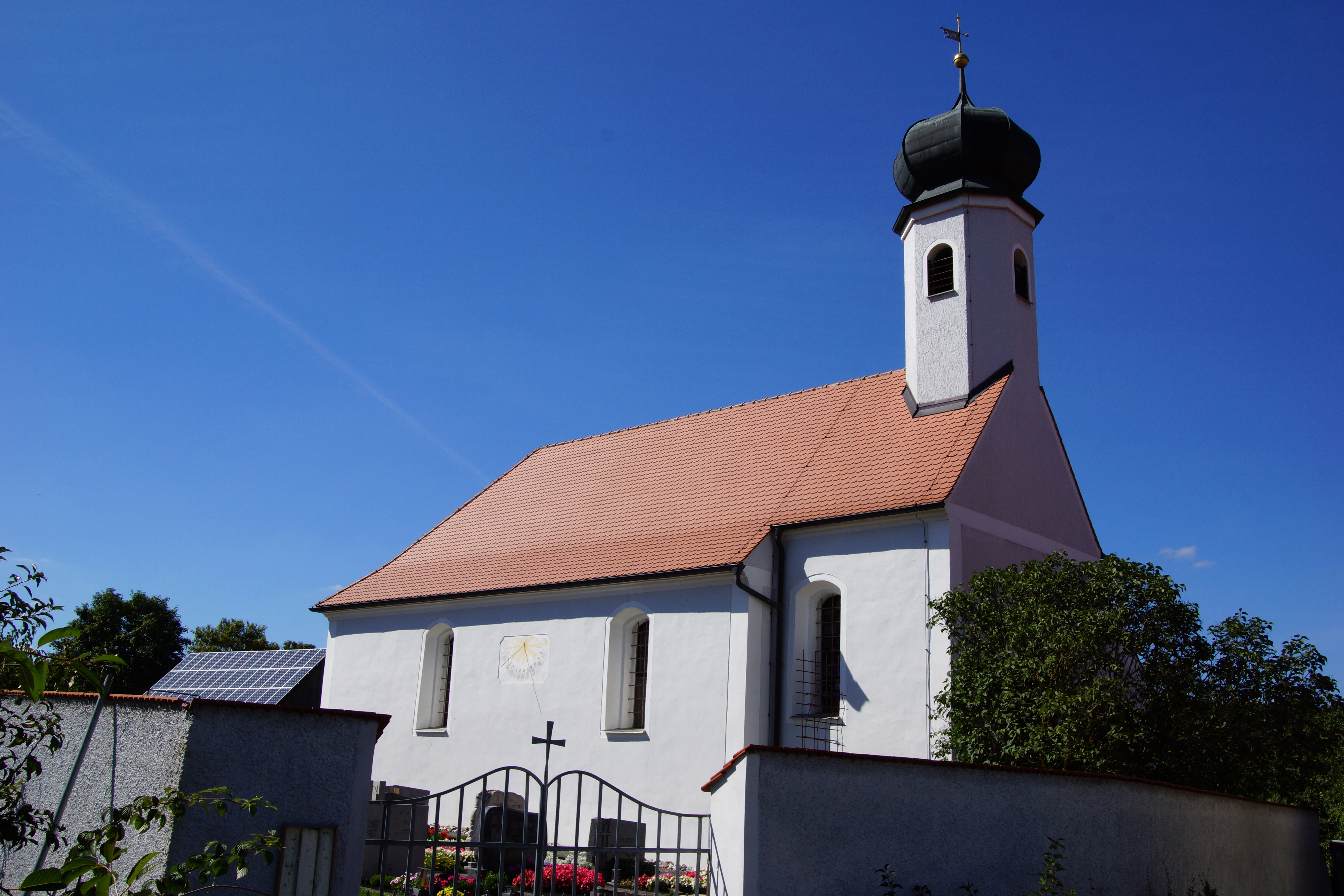 Die katholische Filialkirche St. Johann Baptist in Albertshofen bei Velburg